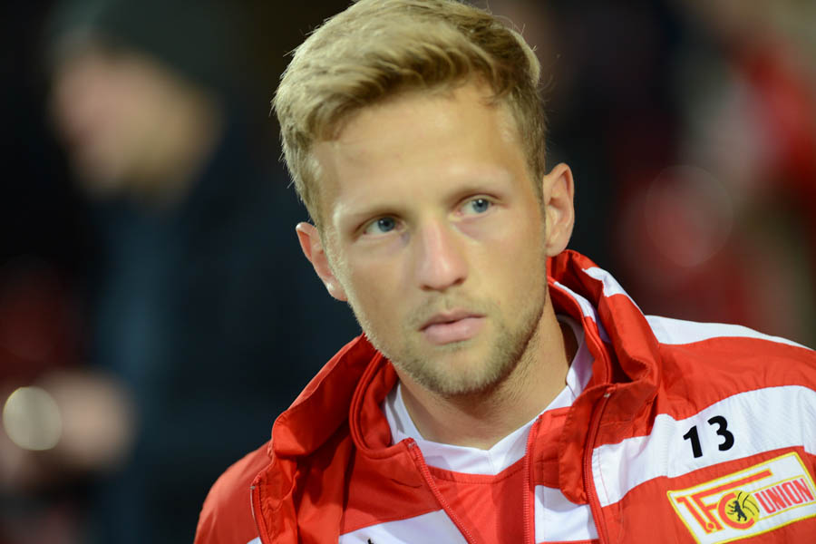 Björn Kopplin vor Anpfiff